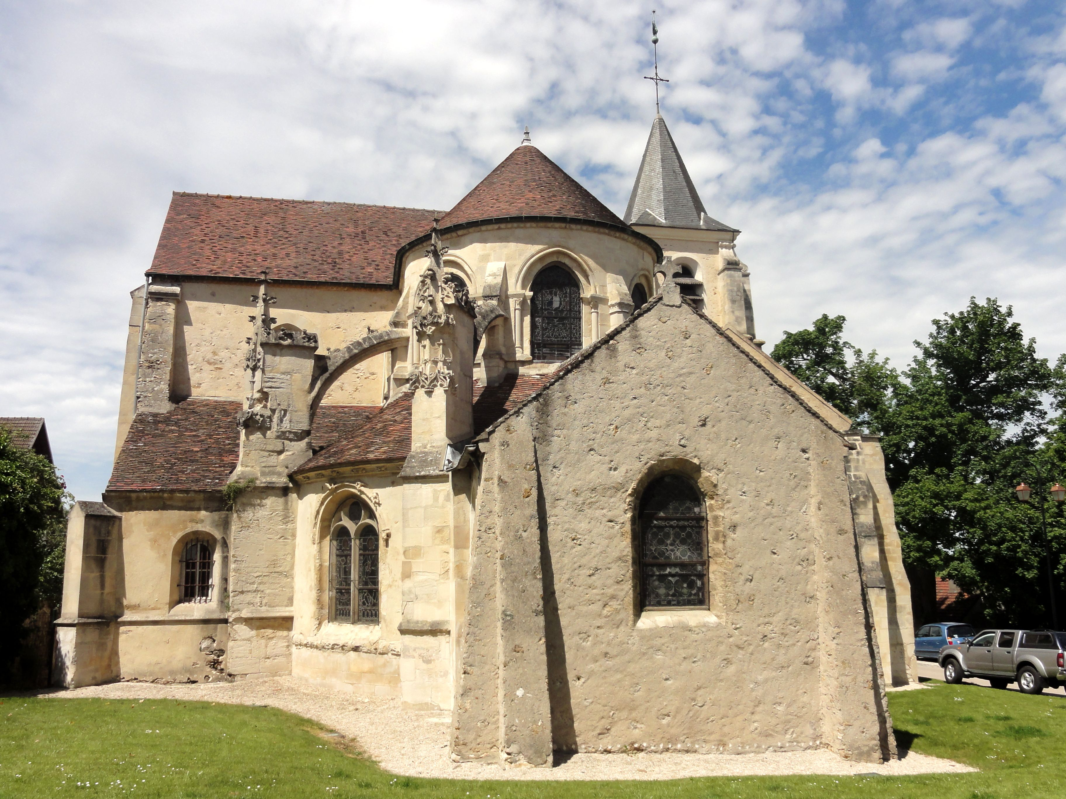 Chevet.